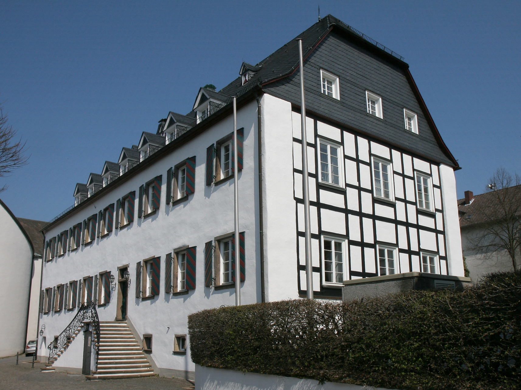 Altes Kloster in Drolshagen. This image shows a heritage building in Germany, located in the North Rhine-Westphalian city Drolshagen (no. 2).